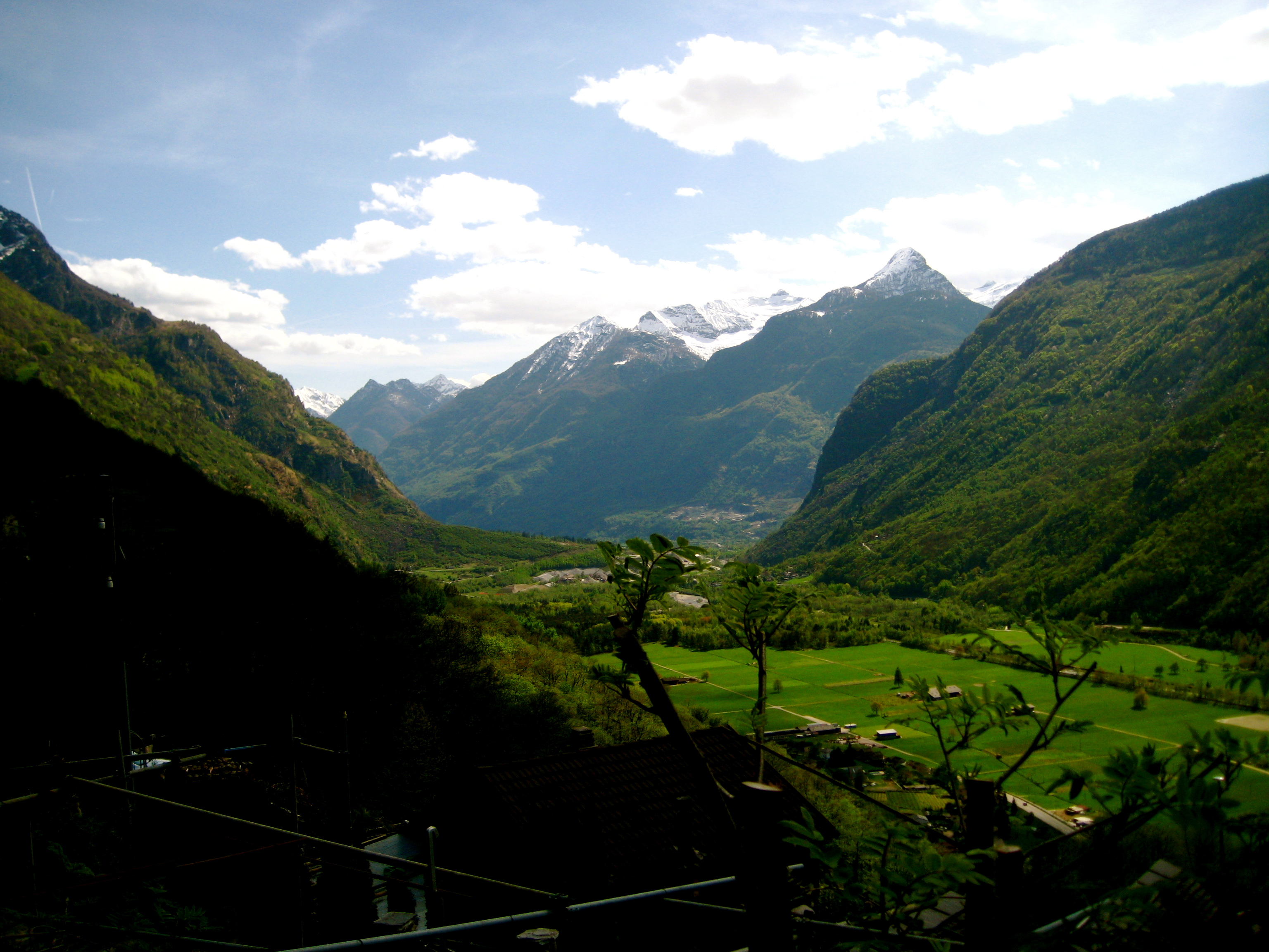 Malvaglia, Ticino